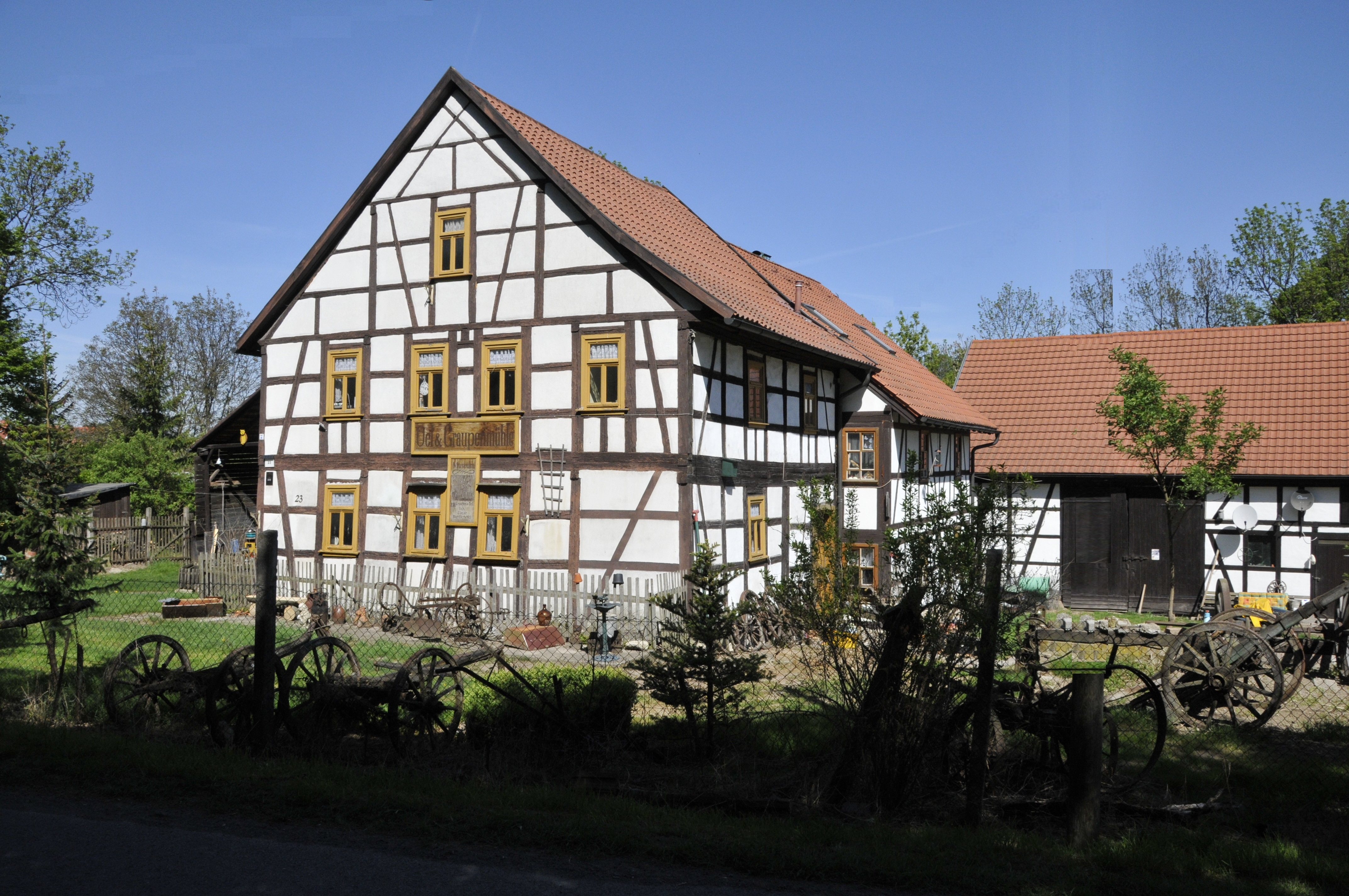 Öl- und Graupenmühle, Haarhäuser Straße 23, Mühlberg, Thüringen